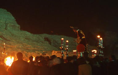 Nuestro Padre Jesús Nazareno de Santiponce, Sevilla en el Anfiteatro de las ruinas de Itálica